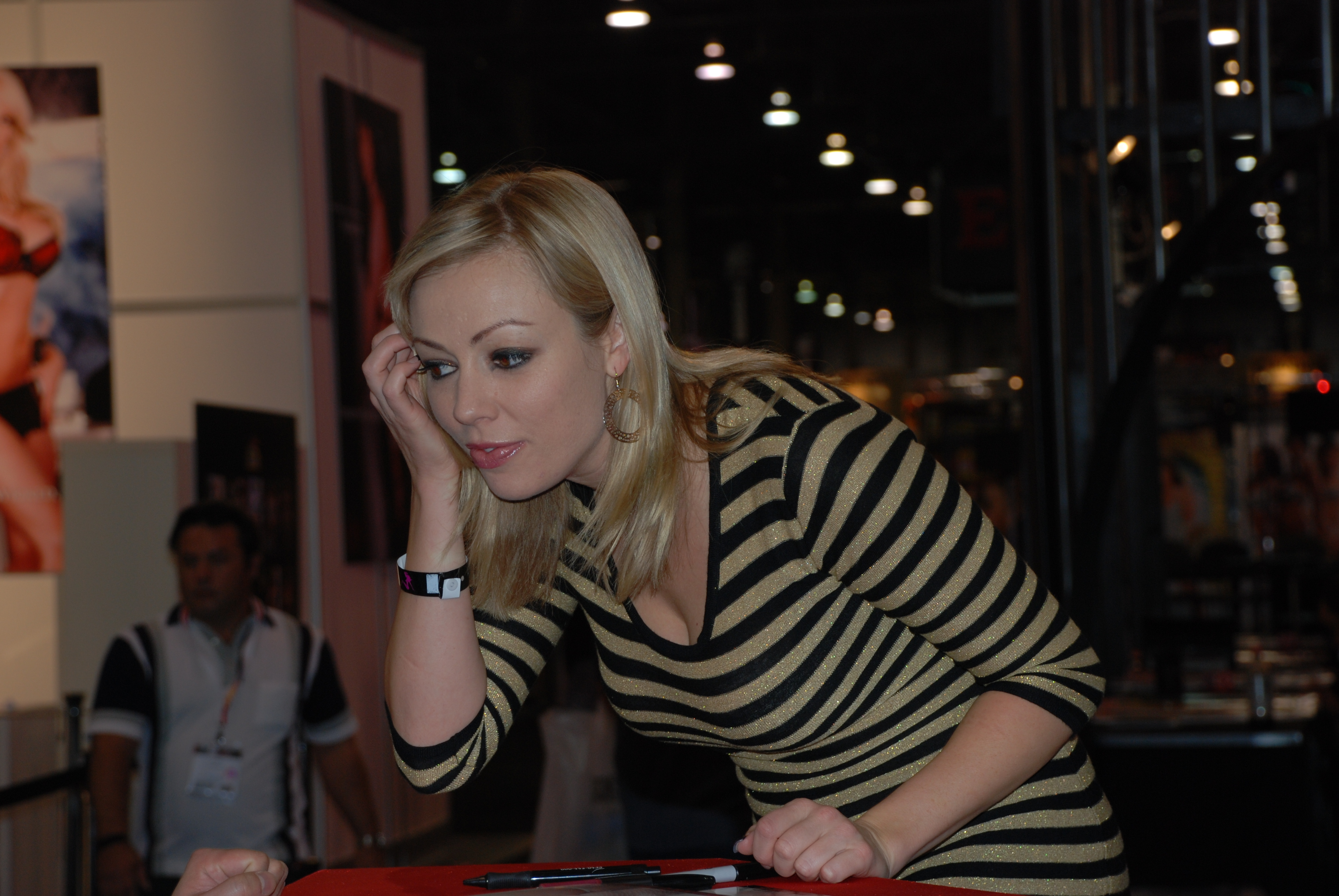 AEE2009_Jan11_Nikon 025